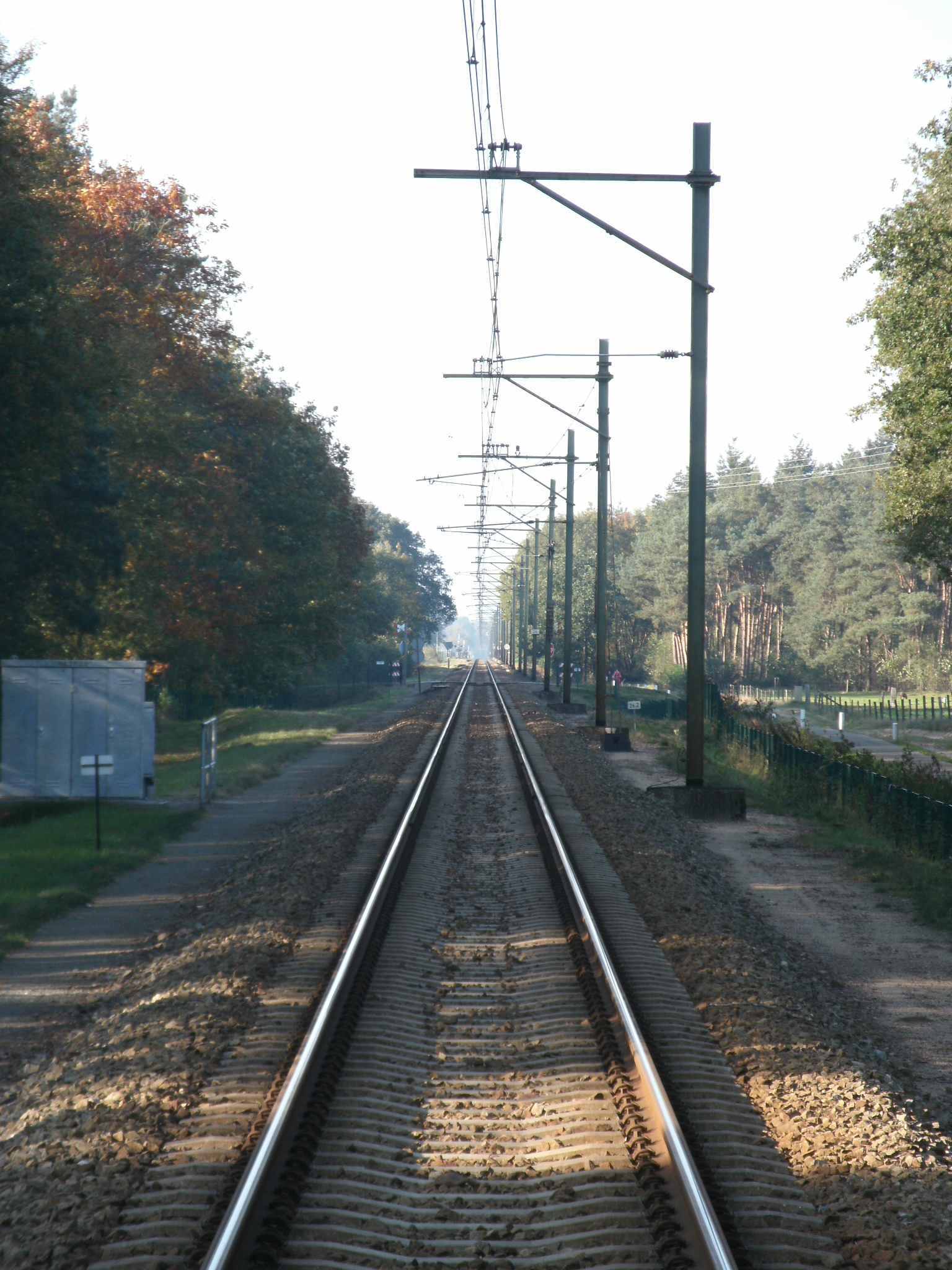 De Valleilijn gezien in de richting van Lunteren. Ter hoogte van de inmiddels afgesloten onbewaakte overweg bij de Doolhoflaan op het Landgoed Kernhem